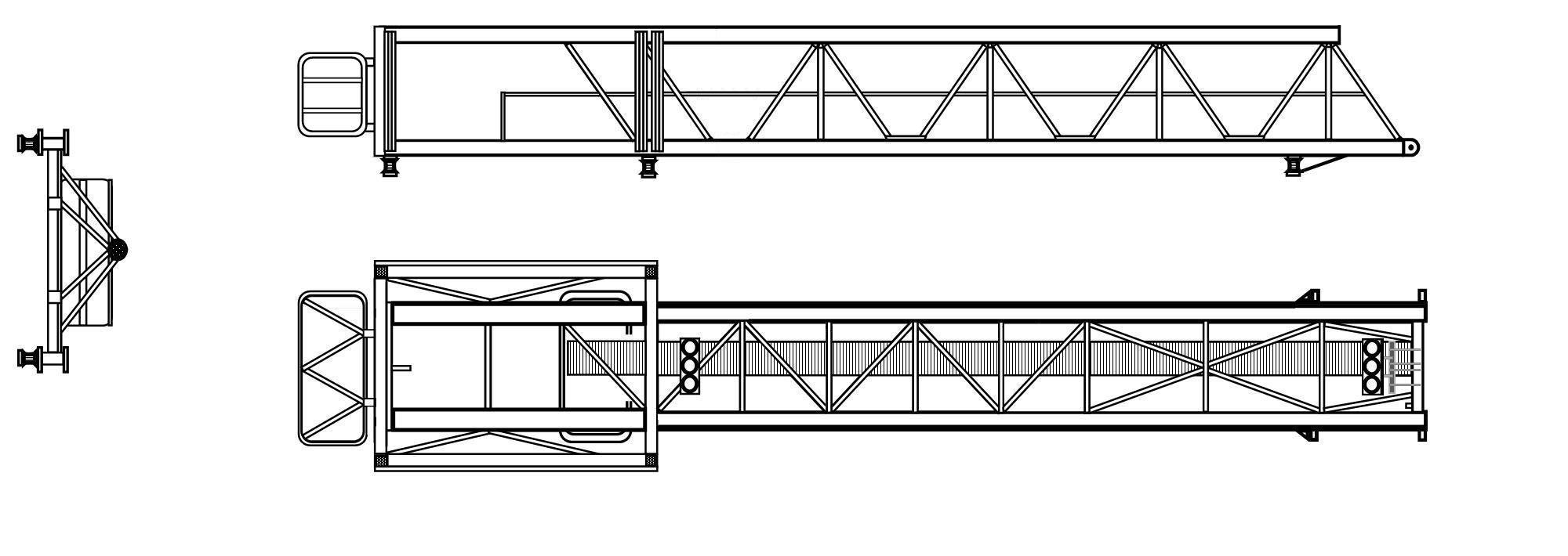 Стойка монтажная КБ-573